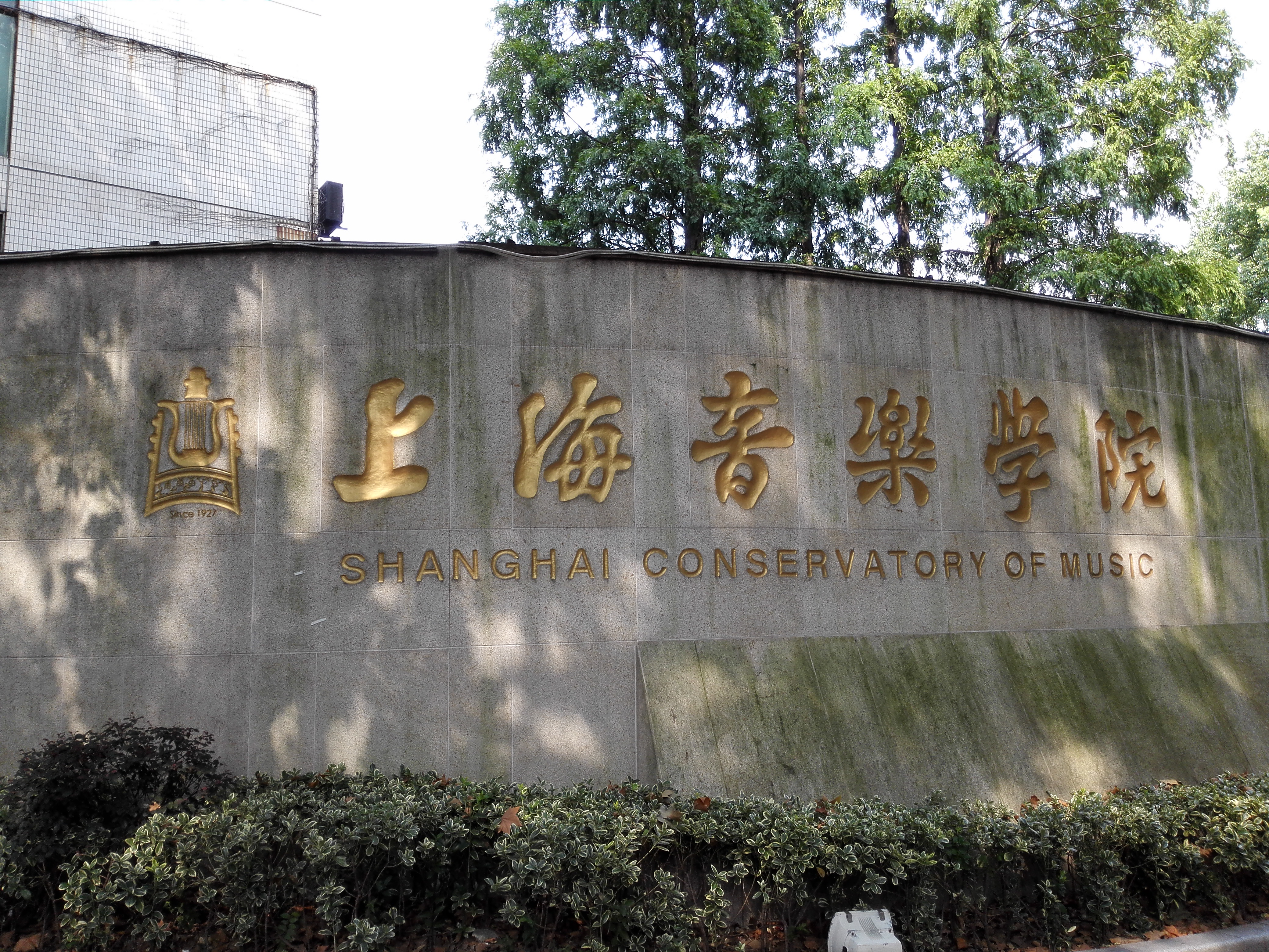 中文（中国大陆）: 上海音乐学院校门口 20150921